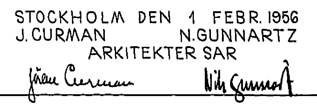 Jöran Curman & Nils Gunnartz namnteckning på en arkitektritning